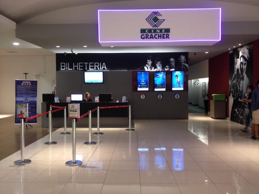 Bilheteria do Cine Gracher instalado na Havan de Brusque